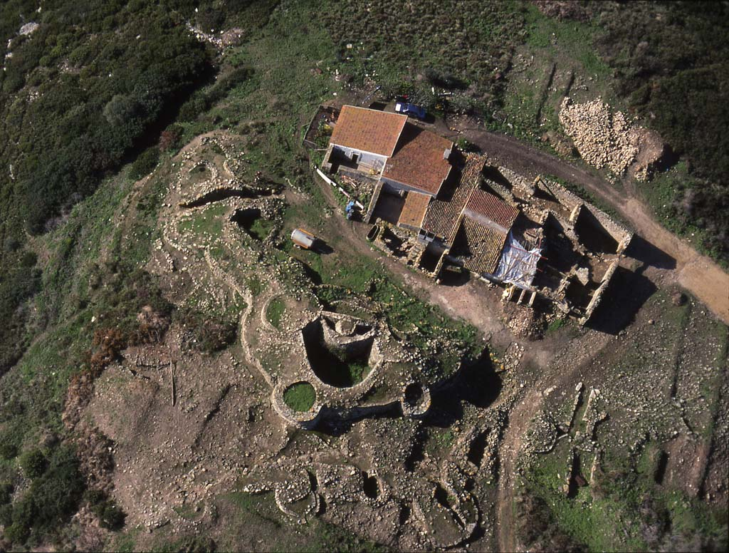 Luftbild von Zambujal: Bildmitte: heutiges Bauernhaus, davor Linie I mit Barbakane und dem Massivturm G (links), davor die beiden Hohltürme B (links) und A (rechts); am unteren Bildrand Linie II.